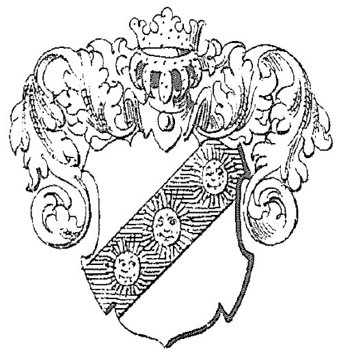 Znak kanovníka Miutiniho Unknown